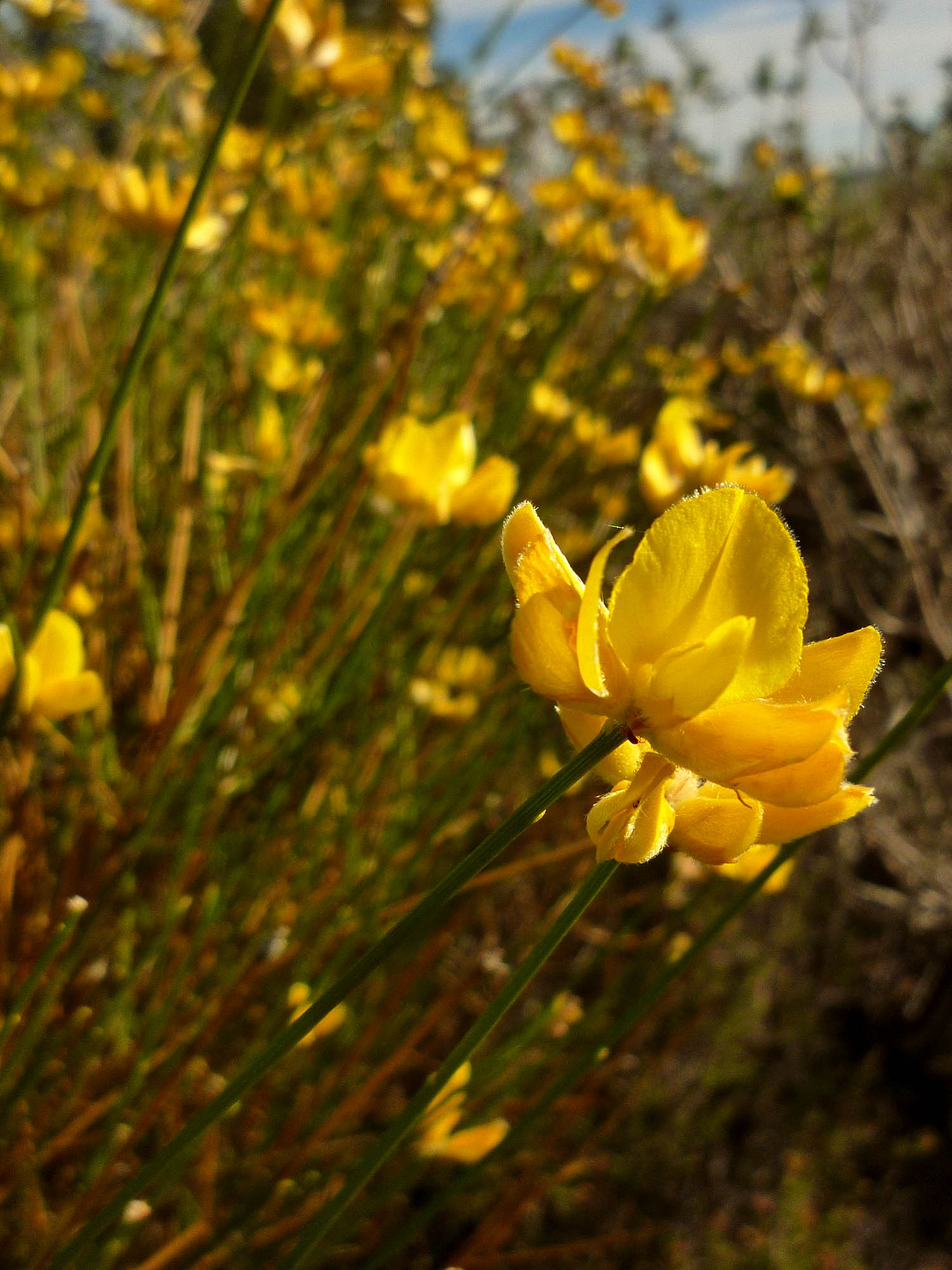 Genista umbellata en la Sierra de la Muela, Cartagena, España.